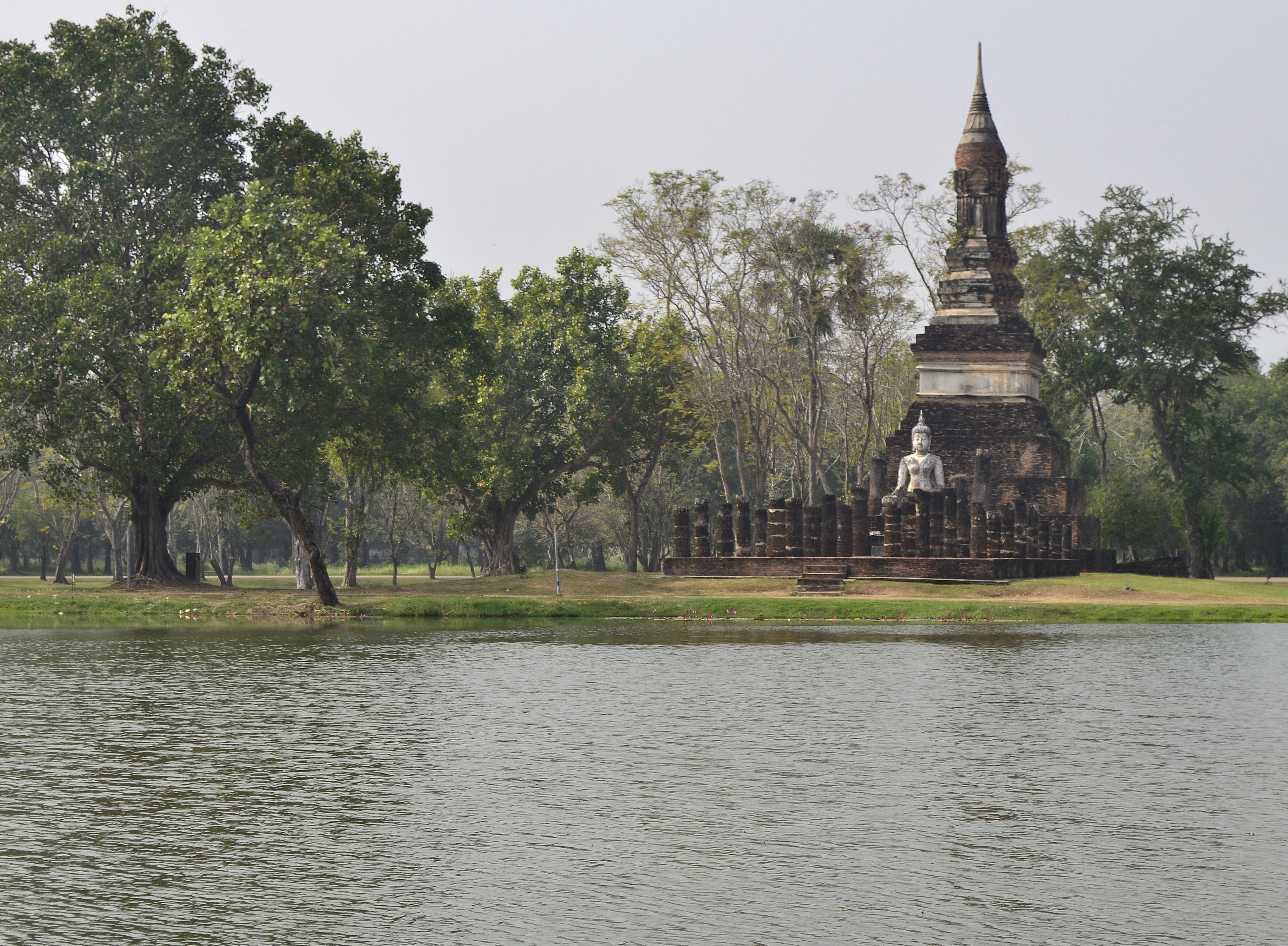 Wat Traphang Ngoen im Geschichtspark Sukhothai